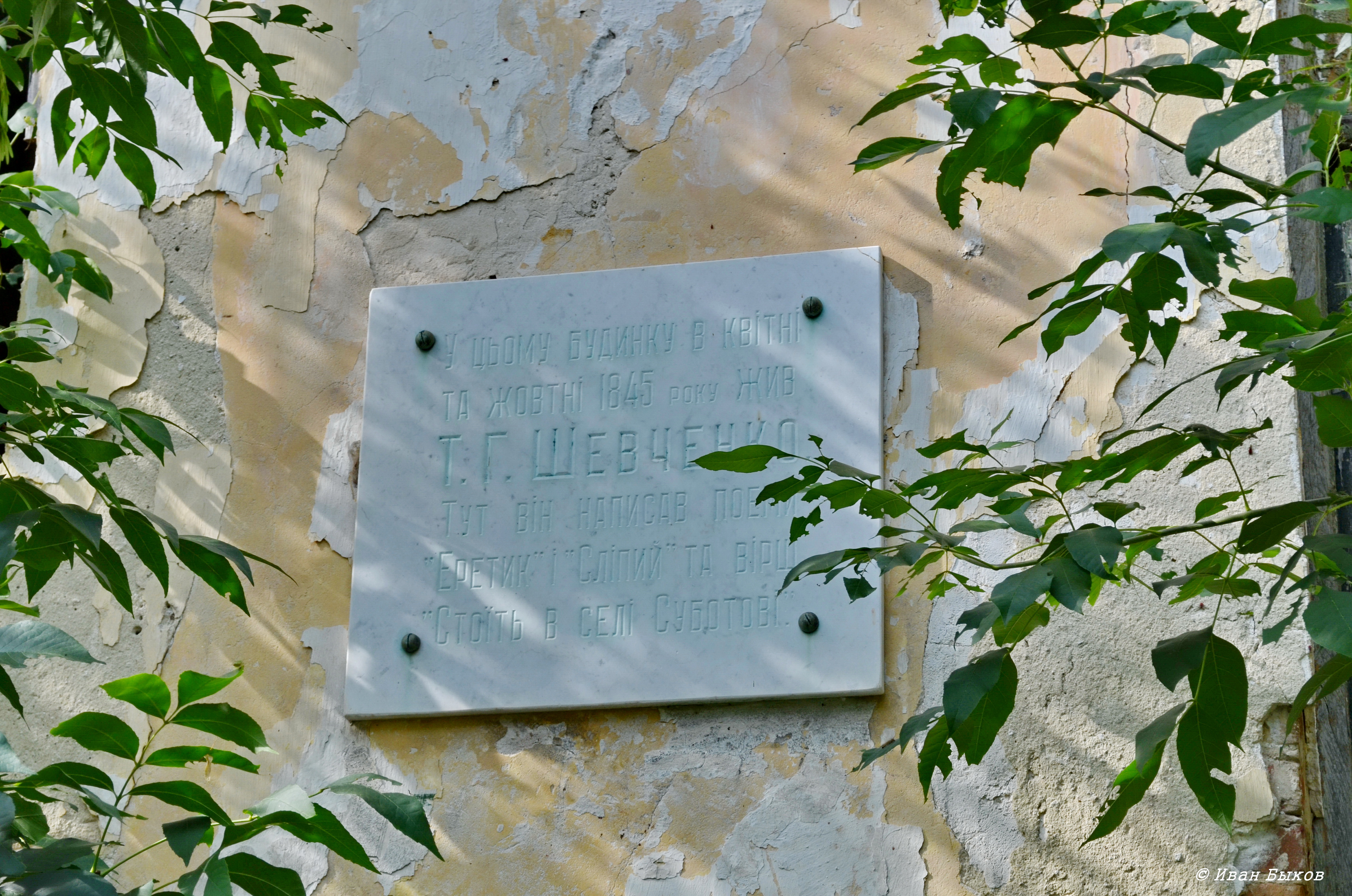 Колишня садиба Лук’яновича, де жив Т.Г.Шевченко в 1845 р.: будинок, комора, дуб, с. Мар’янське